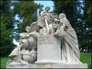 Die Hoffnung tröstet die Trauer, Denkmal im Park von Schloss Hohenzieritz. Herzog Karl II. ließ es 1798 im Gedenken an seine früh verstorbenen Frauen und Kinder von seinem Hofbaumeister und Bildhauer Christian Philipp Wolff errichten.